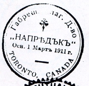 габрешкото Дружество "Напредък", Торонто, 1911